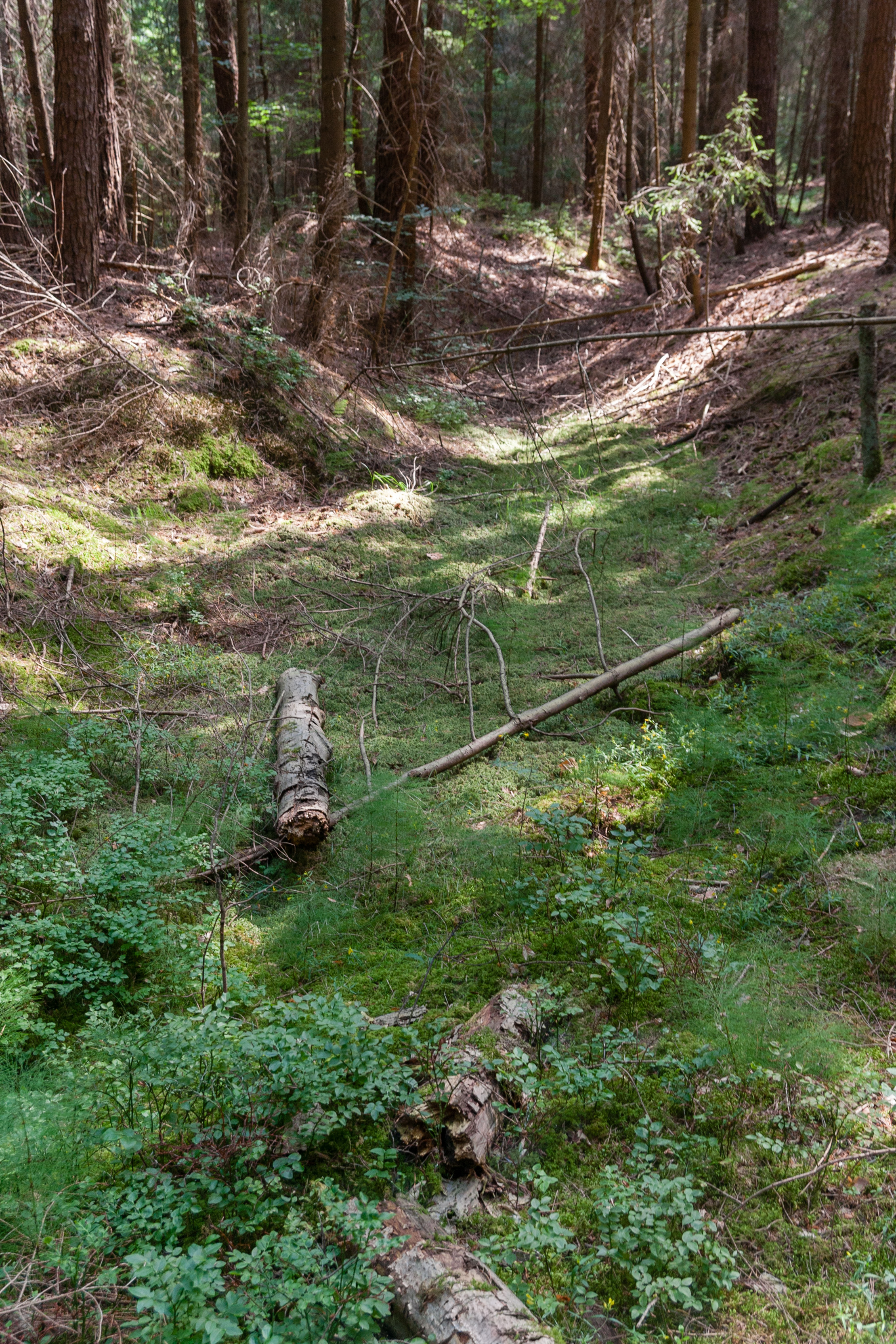 Gefütterter Graben, Westteil